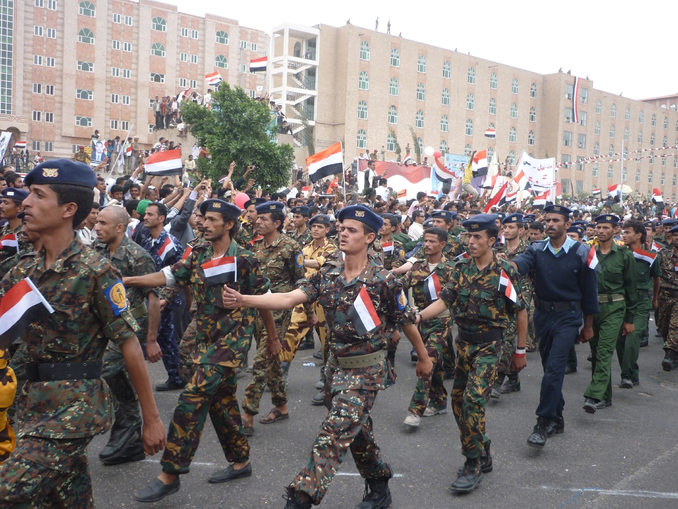 جنود يمنيون من الامن المركزي والشرطة والامن العام في شارع الستين بصنعاء اثناء احتفال اقامة شباب الثورة بمناسبة عيد الوحدة اليمنية Yemeni soldiers from the Police